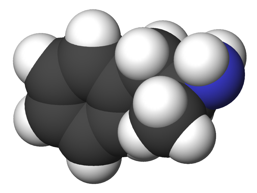 Amphetamine